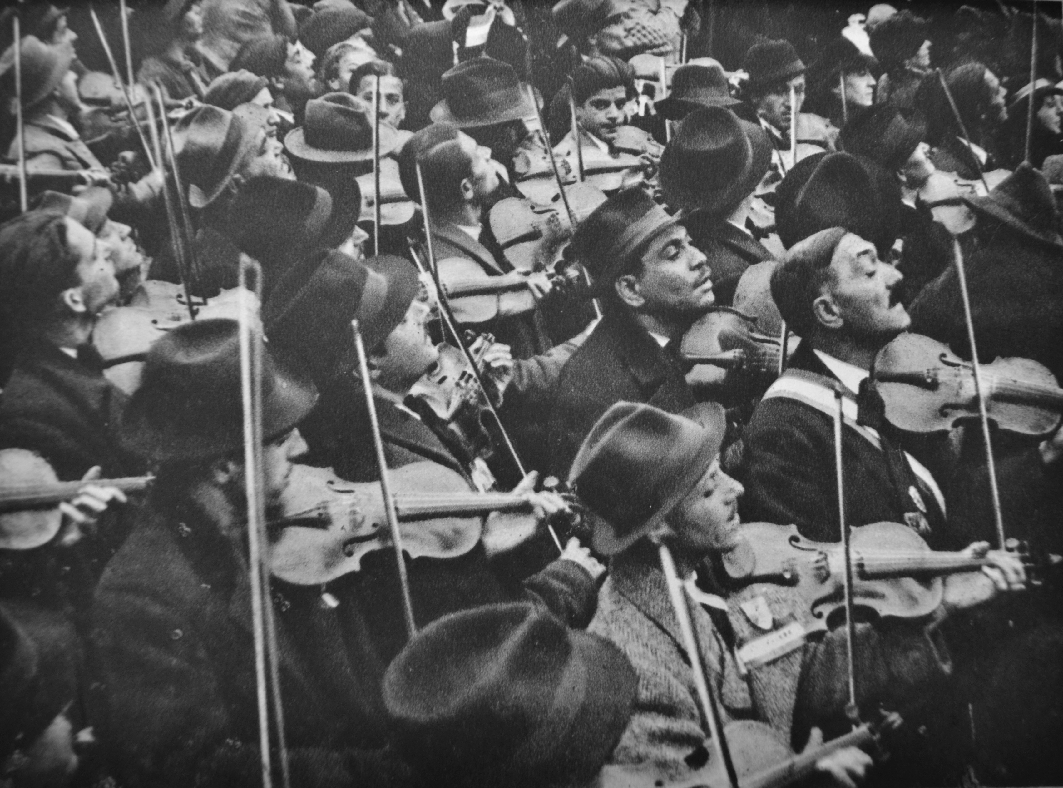 Po prvej viedenskej arbitráži, ktorá sa konala 2. novembra 1938, 8. novembra pripadli Nové Zámky Maďarsku (na snímke sú rómski hudobníci, v Československu bola maďarská rómska hudba zakázaná)